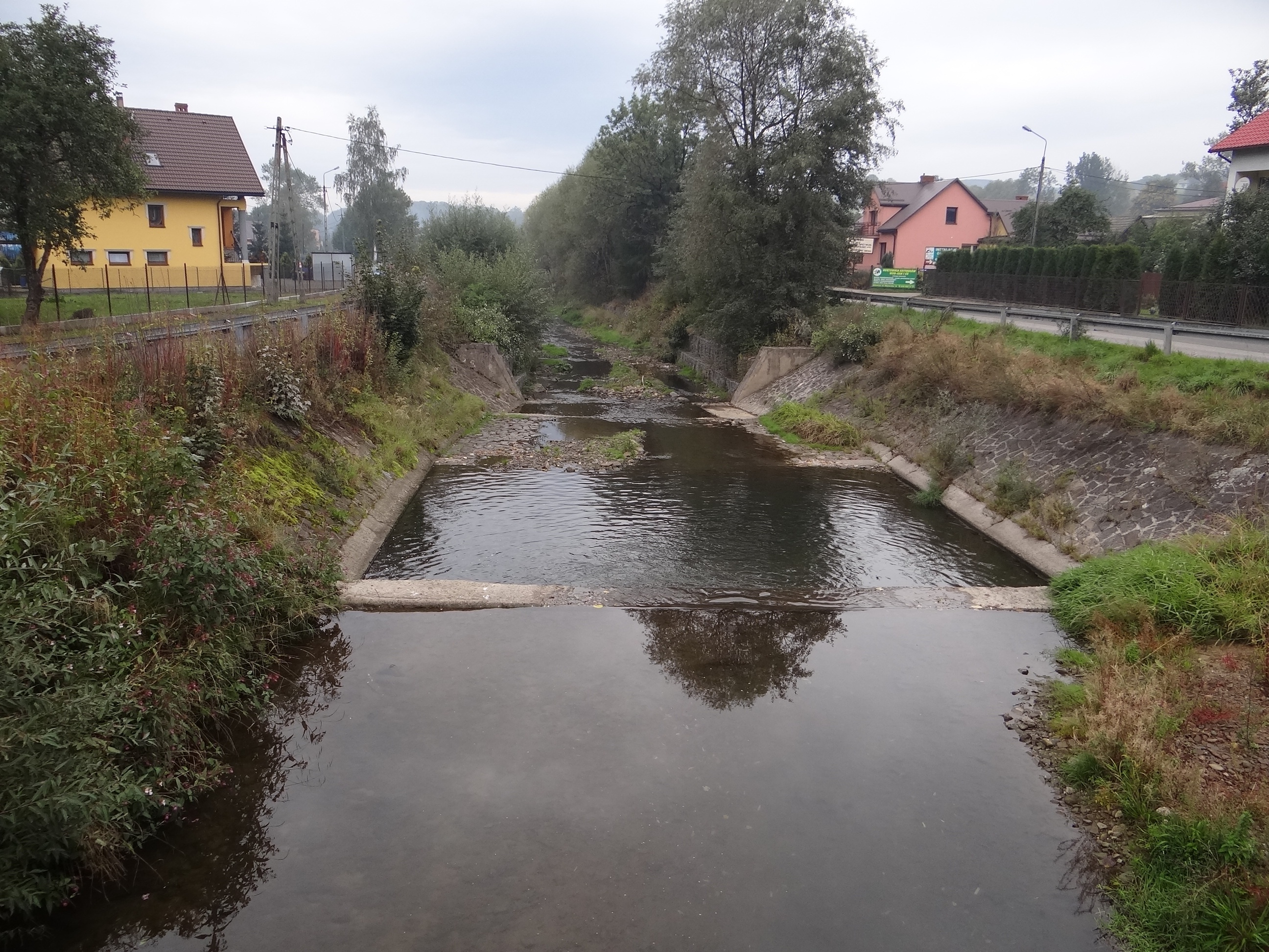 Łękawka i fragment miejscowości Łękawica